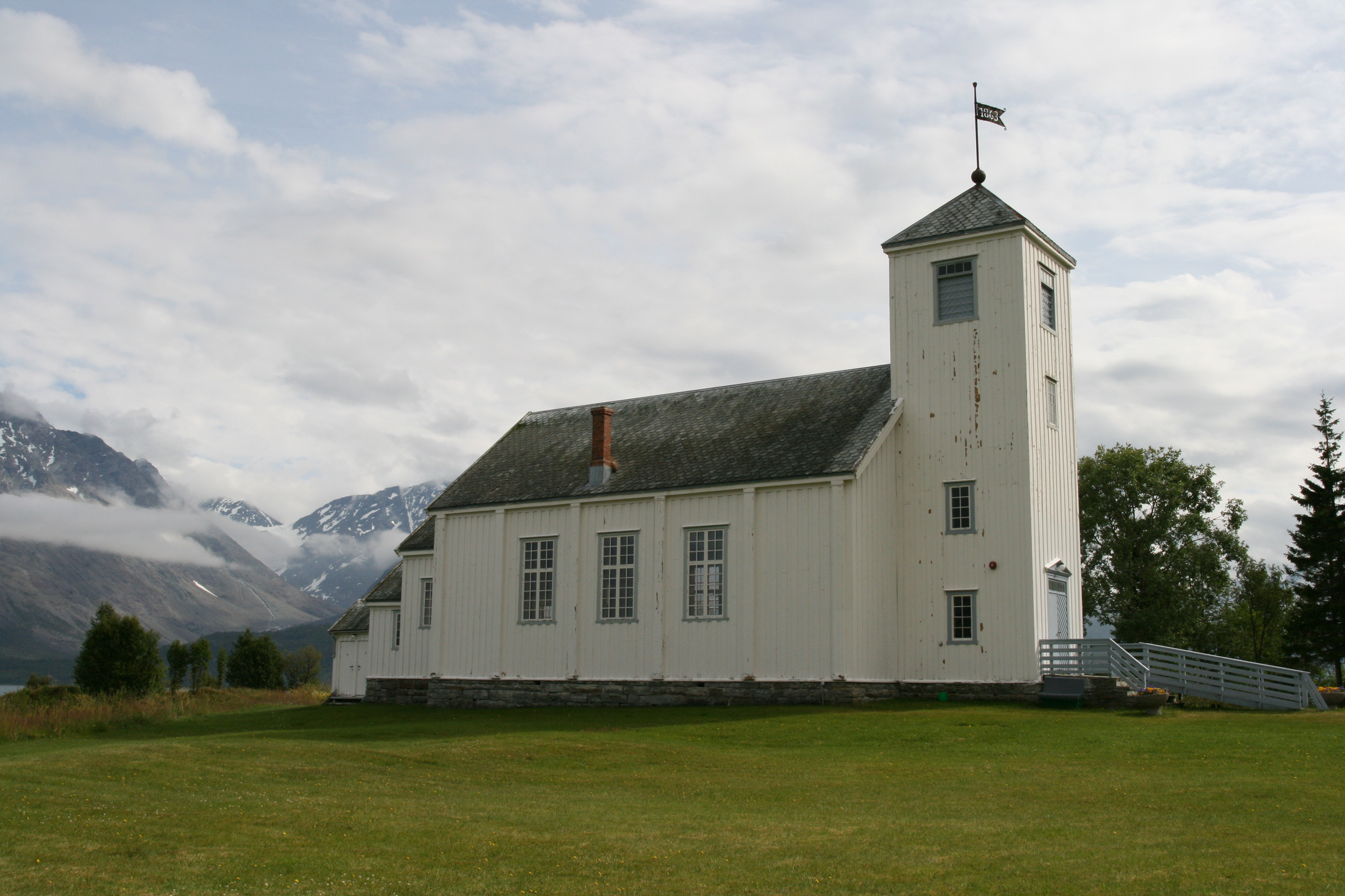 Ullsfjord kirke i Troms. Arkitekter: Christian Heinrich Grosch og Knudtzon.